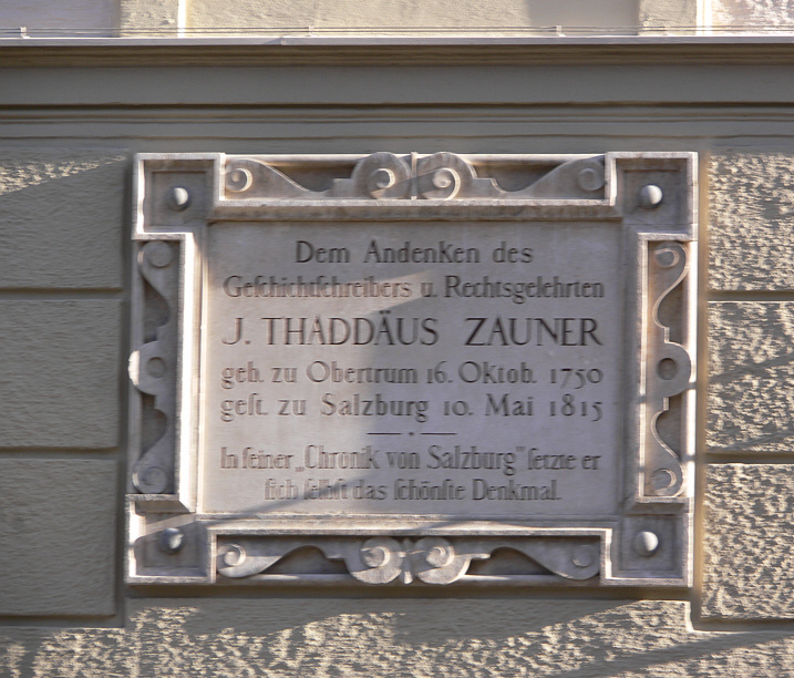 Alte Universität, Universitätsplatz, Tafel für J. Thaddäus Zauner